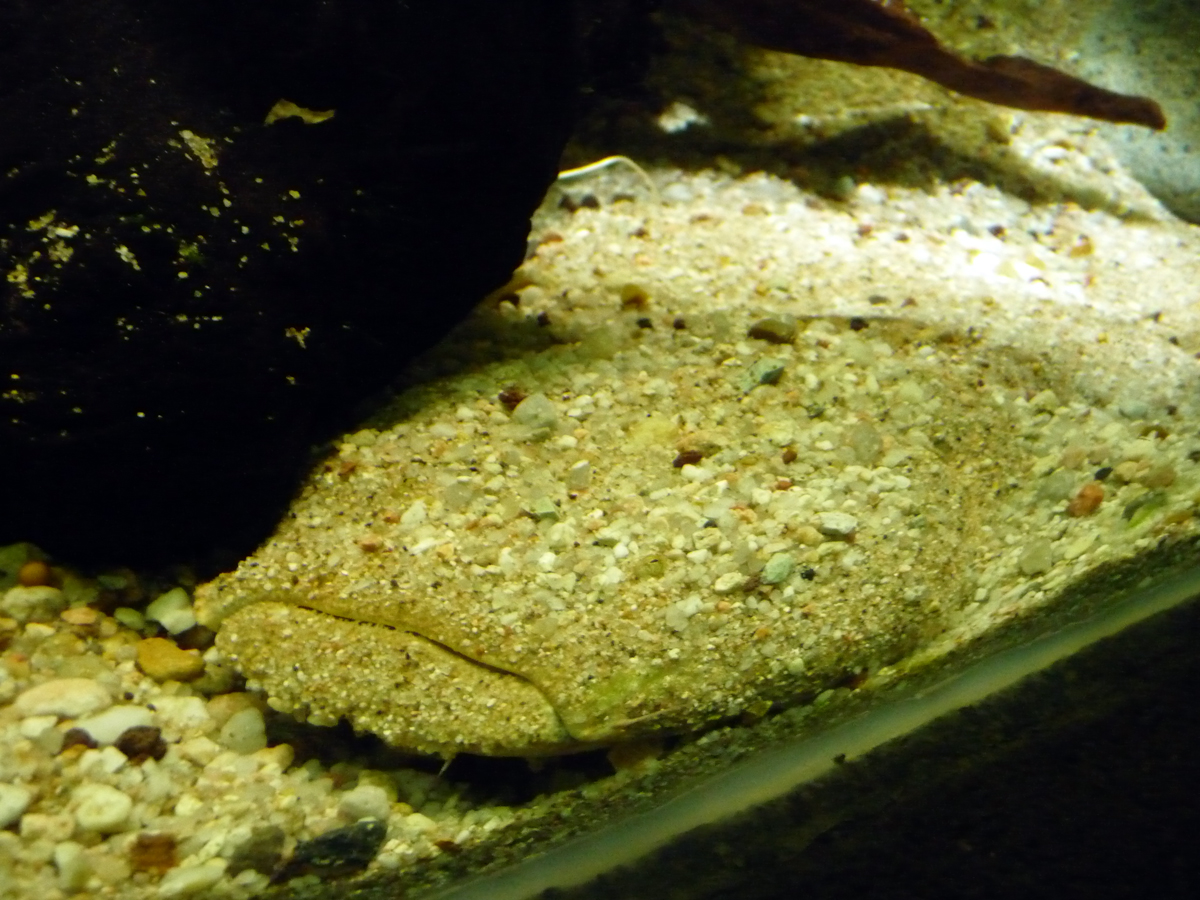 Ænglisc: Lophiosilurus alexandri